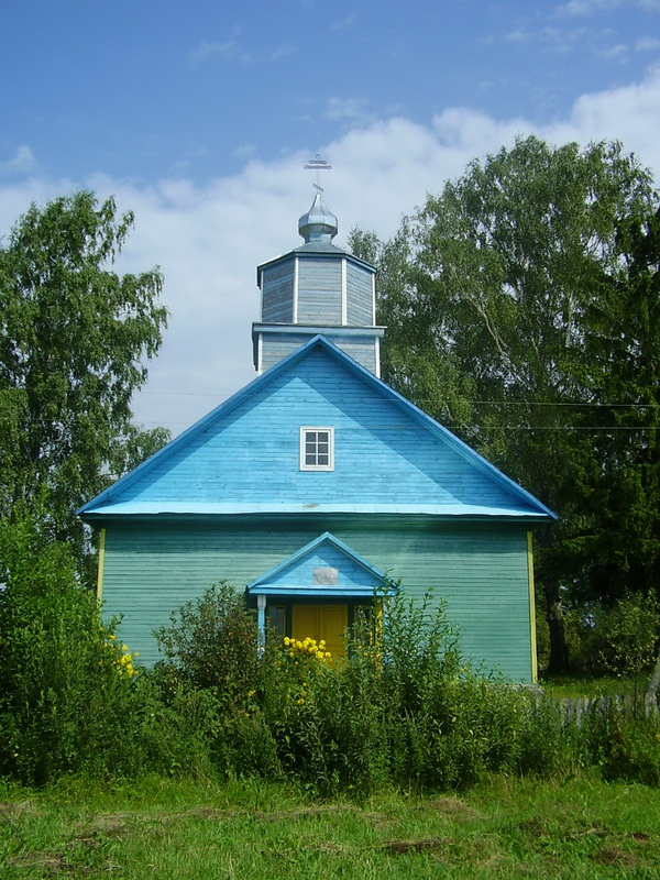 Ніўнікі. Свята-Успенская царква This is a photo of Belarusian heritage monument. Reference number: 213Г000565 ( WLM)